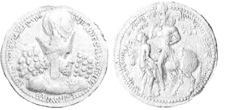 Dinar de ouro de Sapor I sobre seu cavalo e o imperador romano Filipe, o Árabe se submetendo.